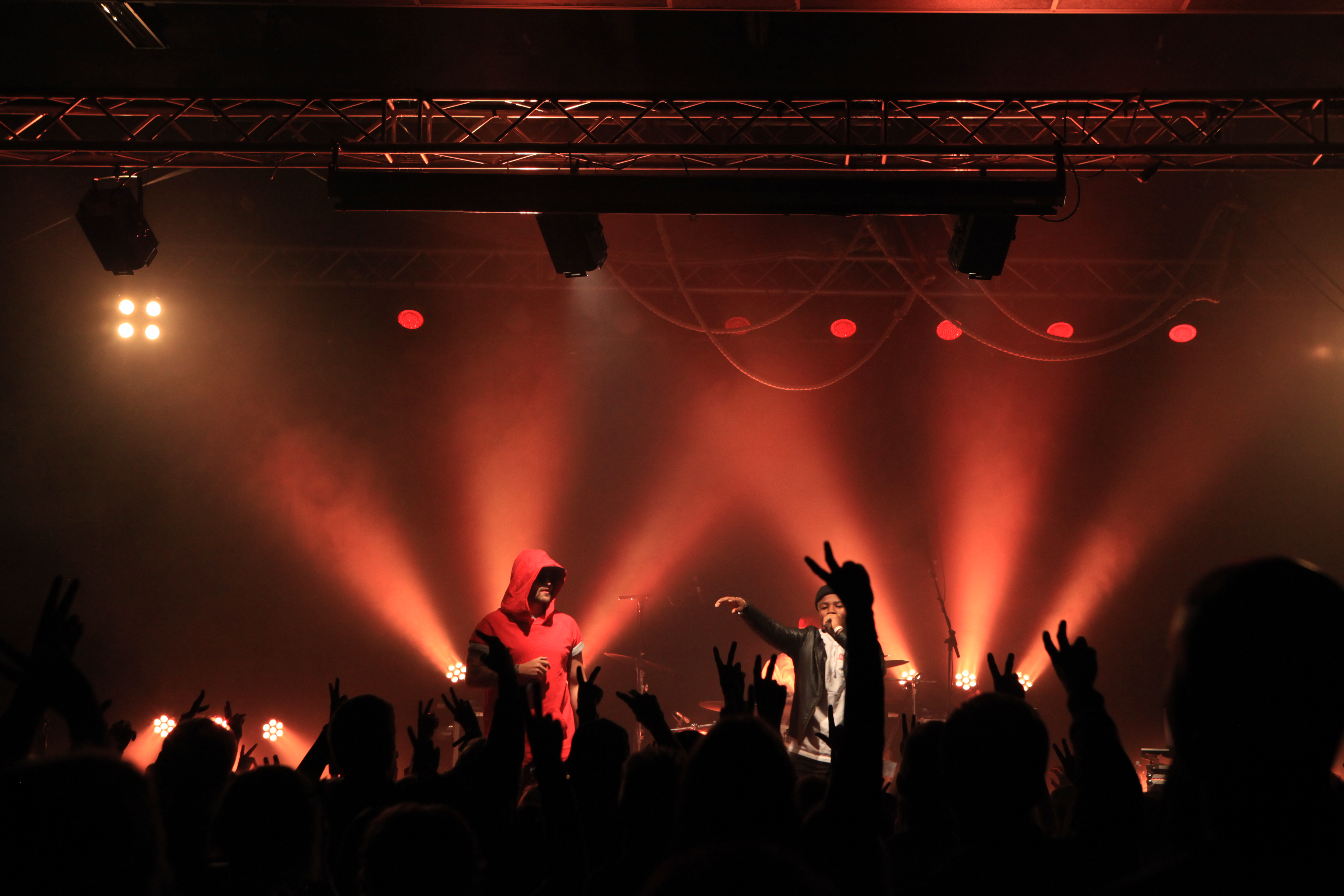 Räppäri Mikaveli esiintymässä ReStart 2015 -tapahtumassa.